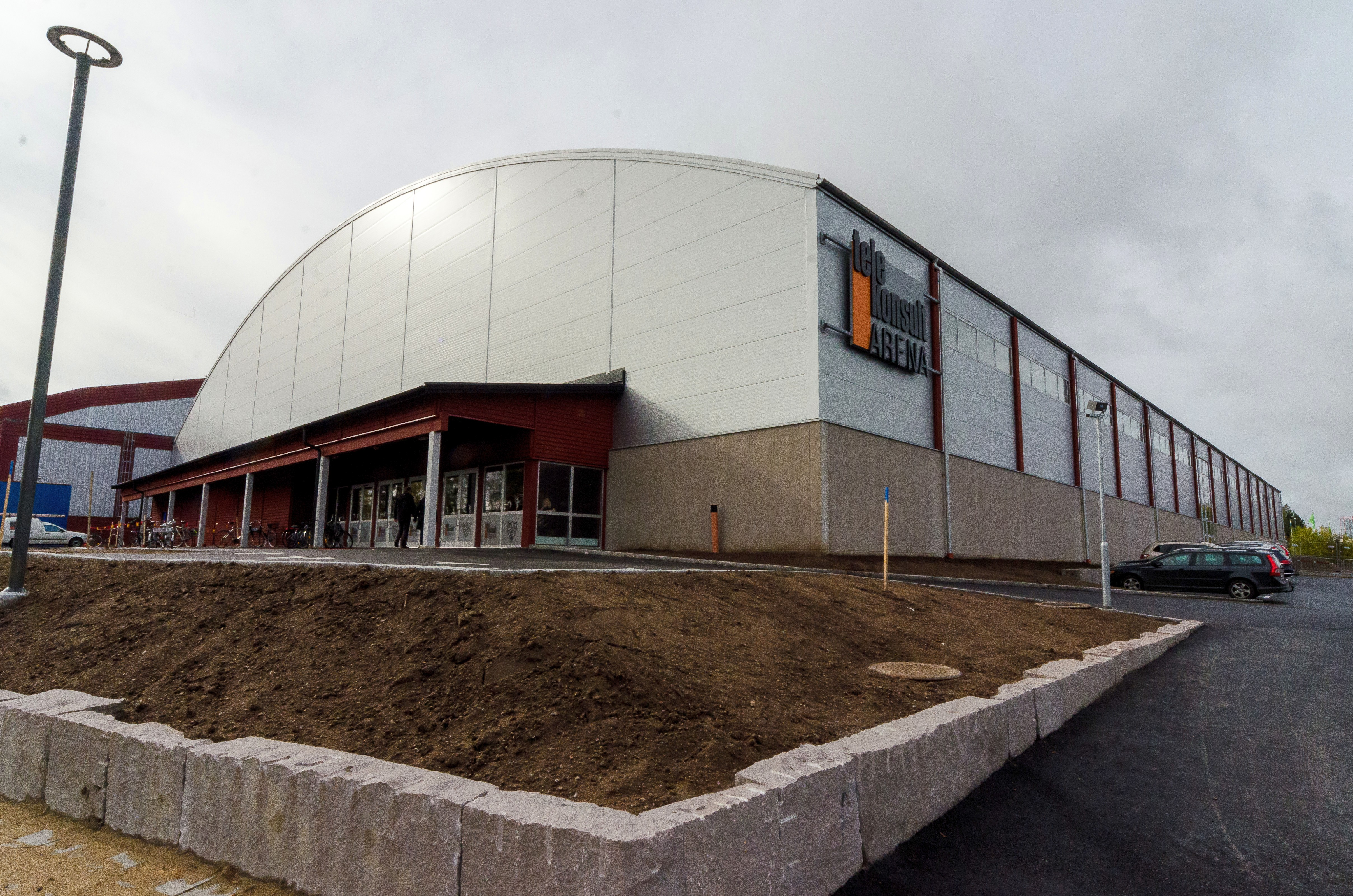 Telekonsult Arenas nordöstra hörn på invigningsdagen 6 oktober 2012.